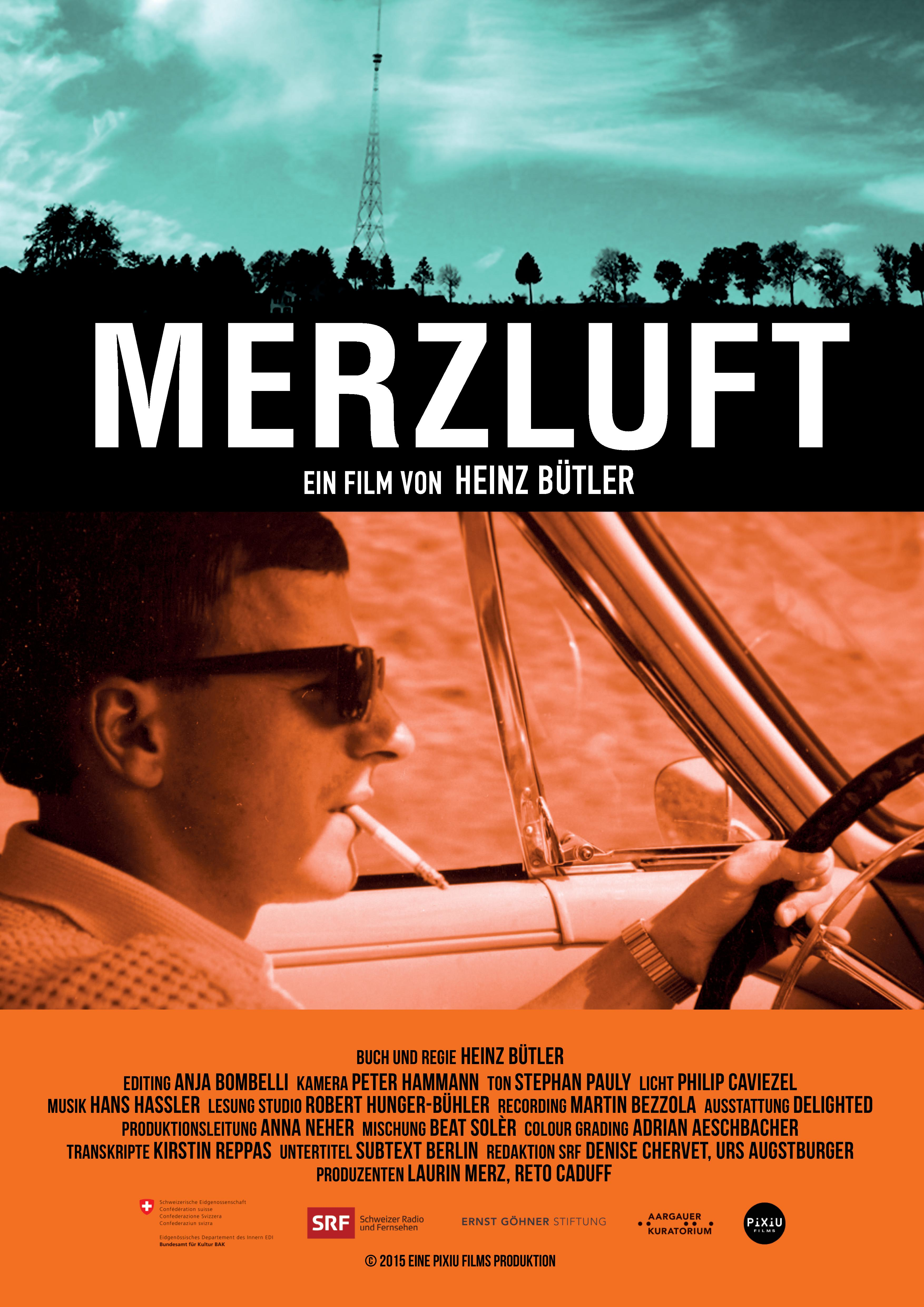 Poster zum Film "Merzluft" (2015)